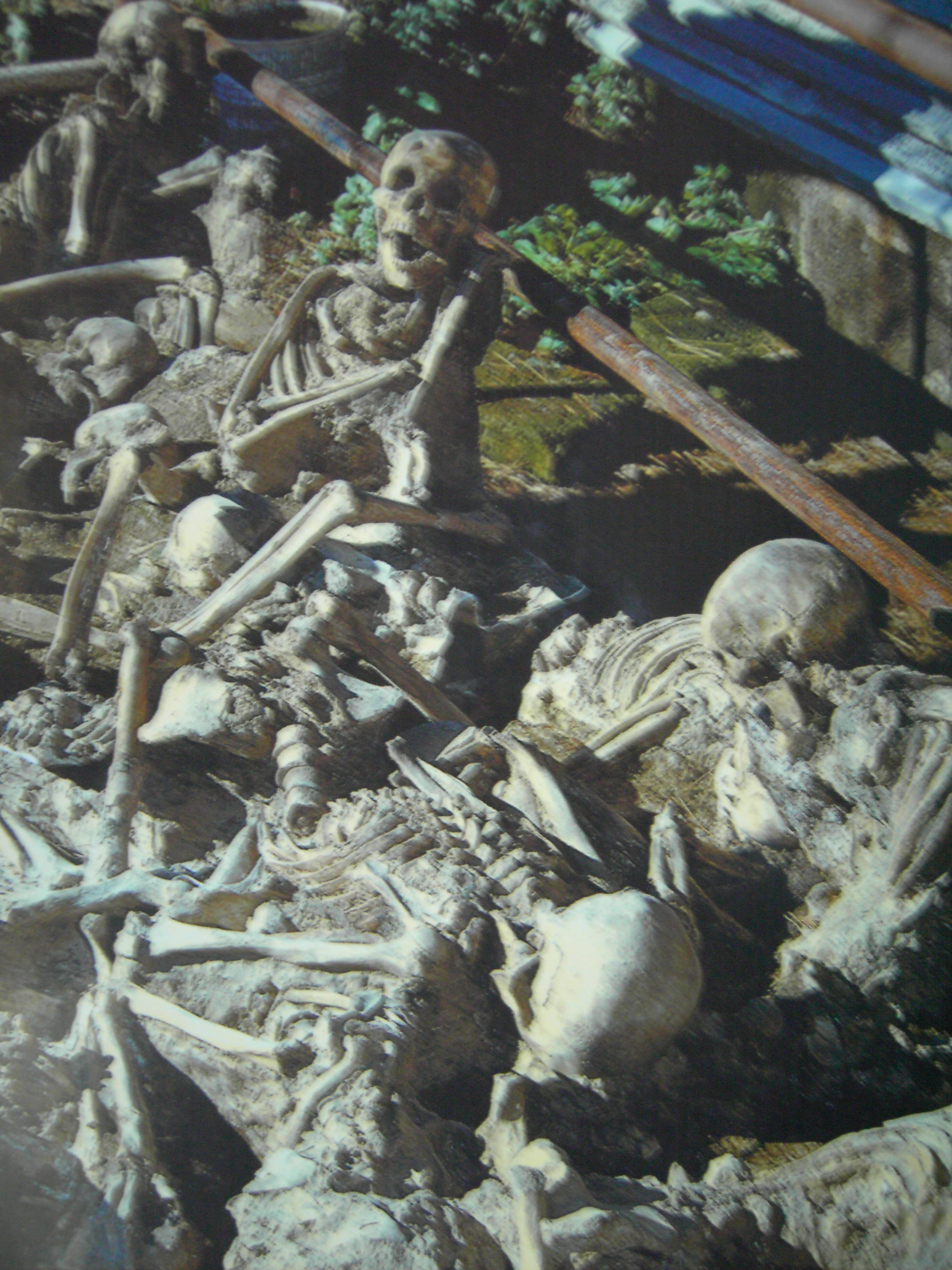 Skelettfunde aus Herculaneum